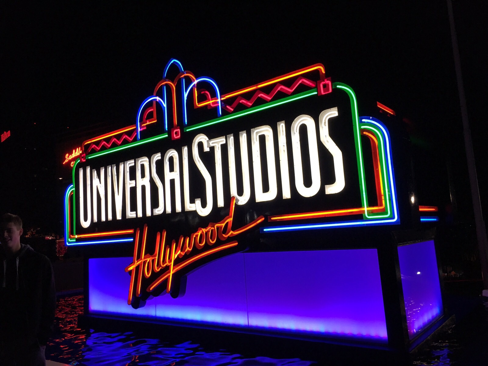 אולפני יוניברסל